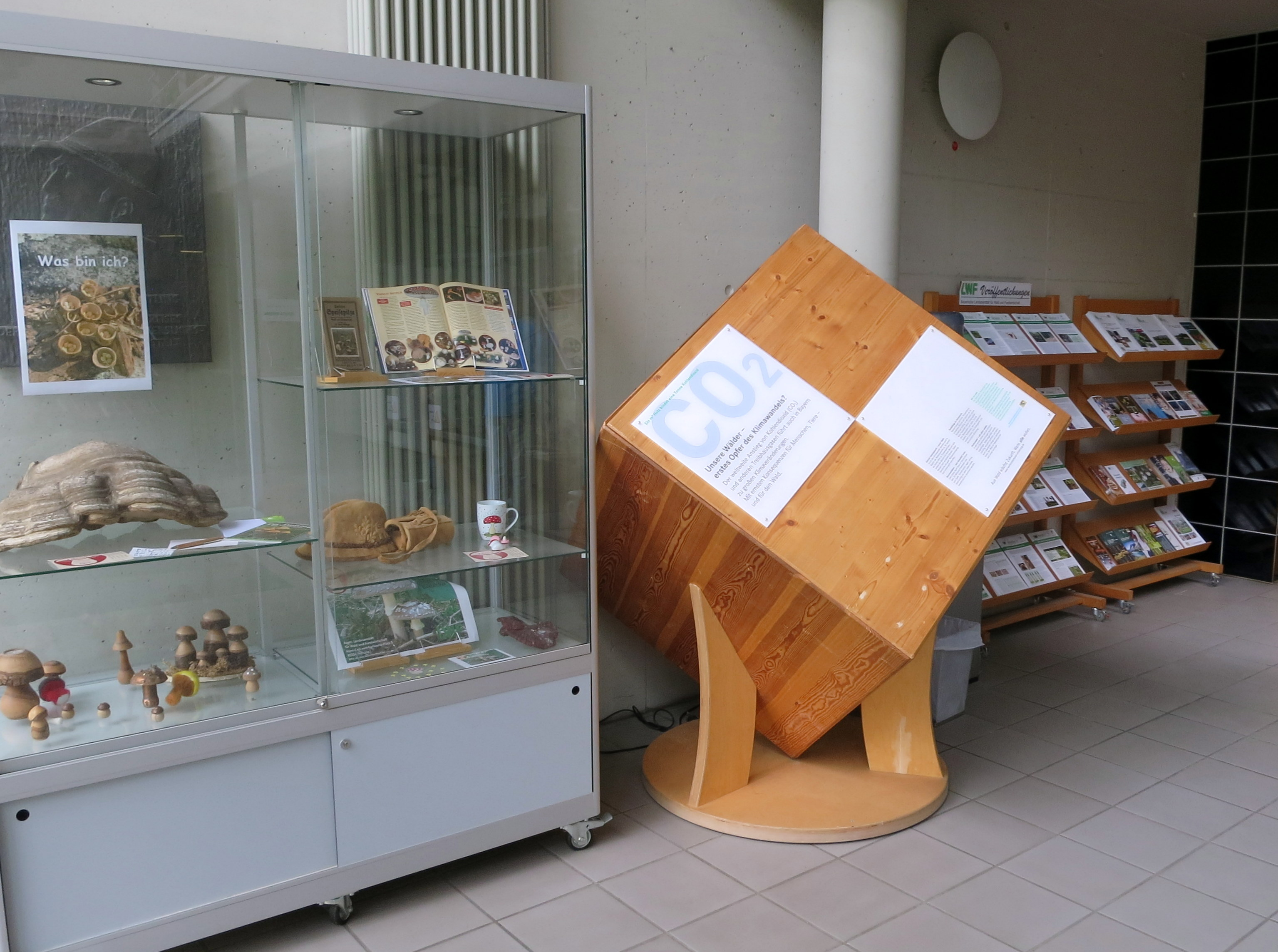 Einige Info-Angebote